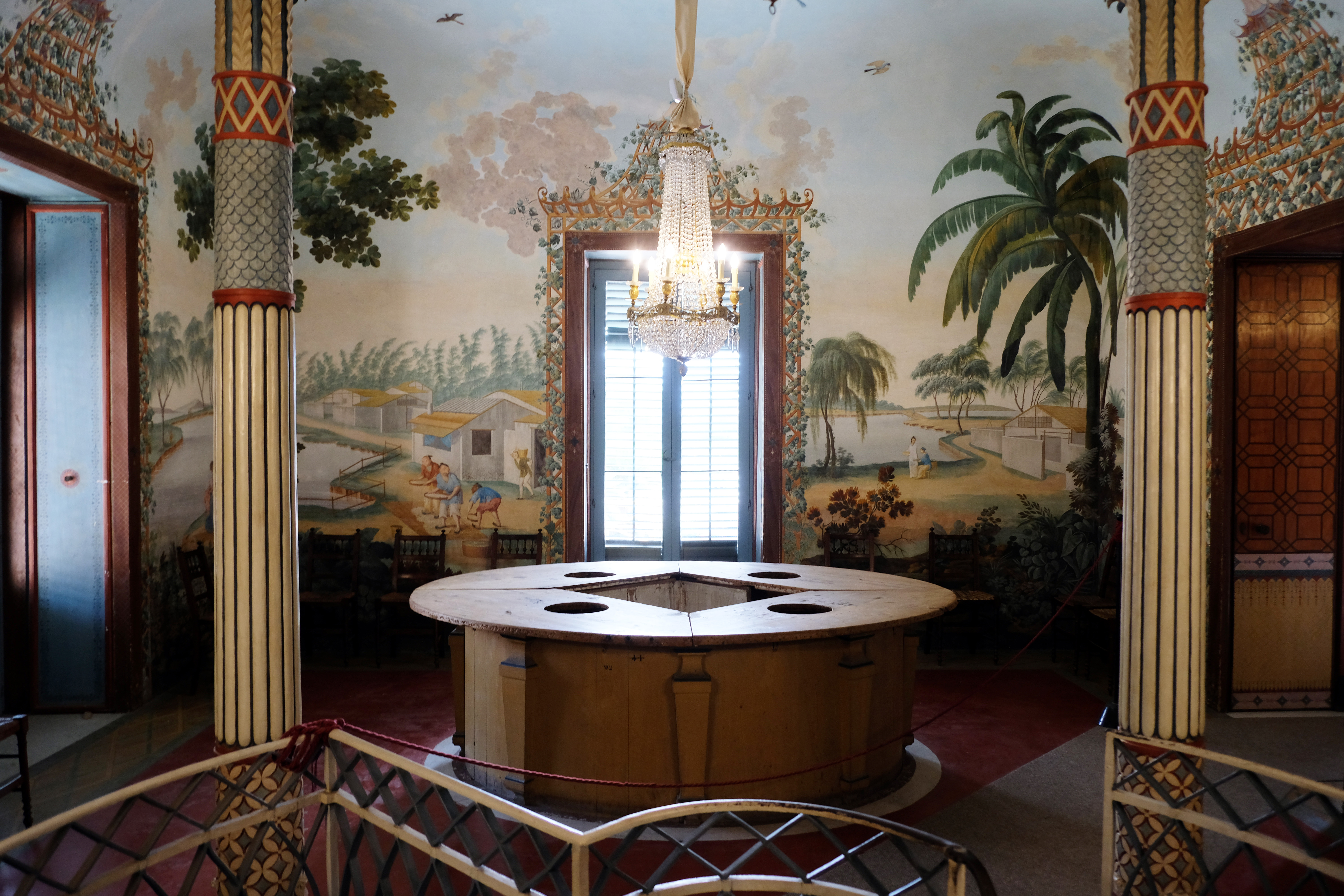 Palazzina cinese (Palermo) - Lunchroom